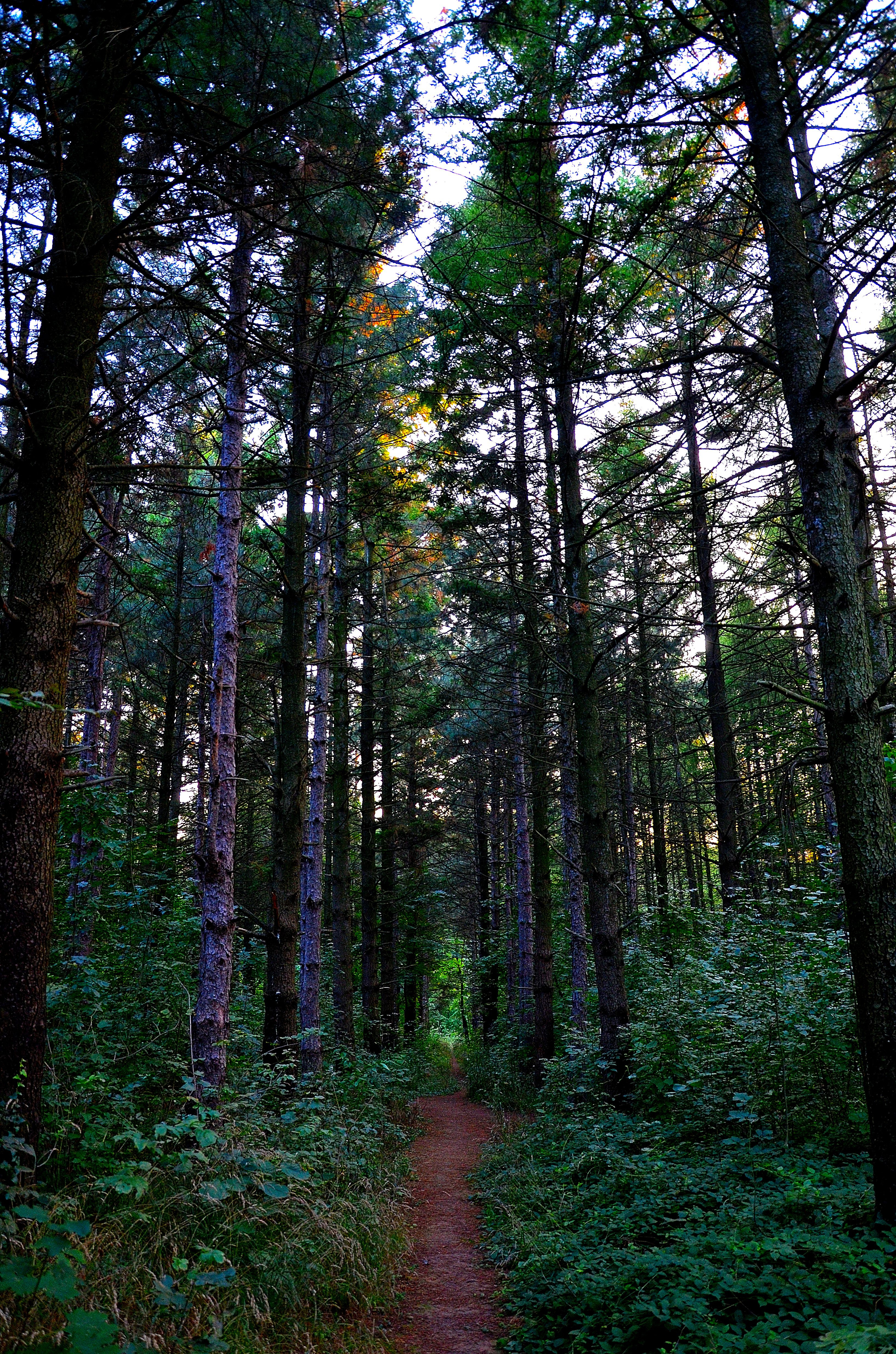 Српски (ћирилица): Миљаковачка шума